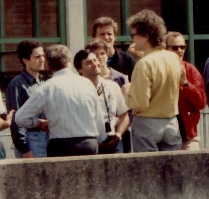 Mohammed Atta (1968-2001) bei einem Vortrag in Bremen-Tenever